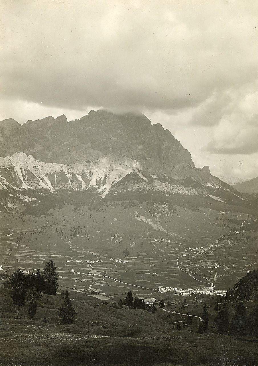 Vue sur la vallée où se niche Cortina d'Ampezzo, commune d'Italie, pendant la Première Guerre mondiale.